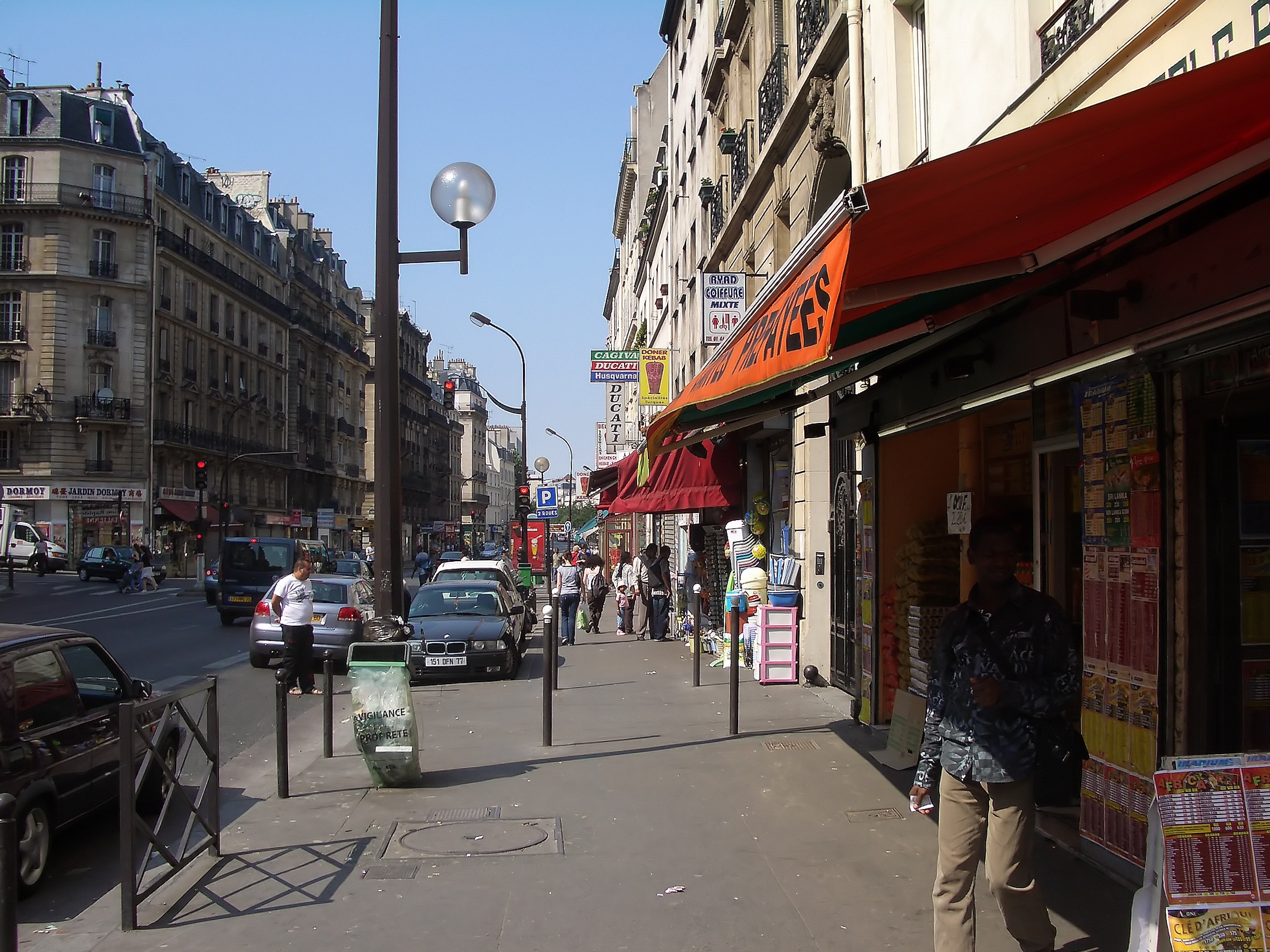 Vue de la rue marx dormoy dans le Quartier de La Chapelle (XVIIIe arrondissement de Paris), regardant vers le nord. Prise le 14 juillet 2006 ; modifiée dans Picasa pour regler le contraste, etc.